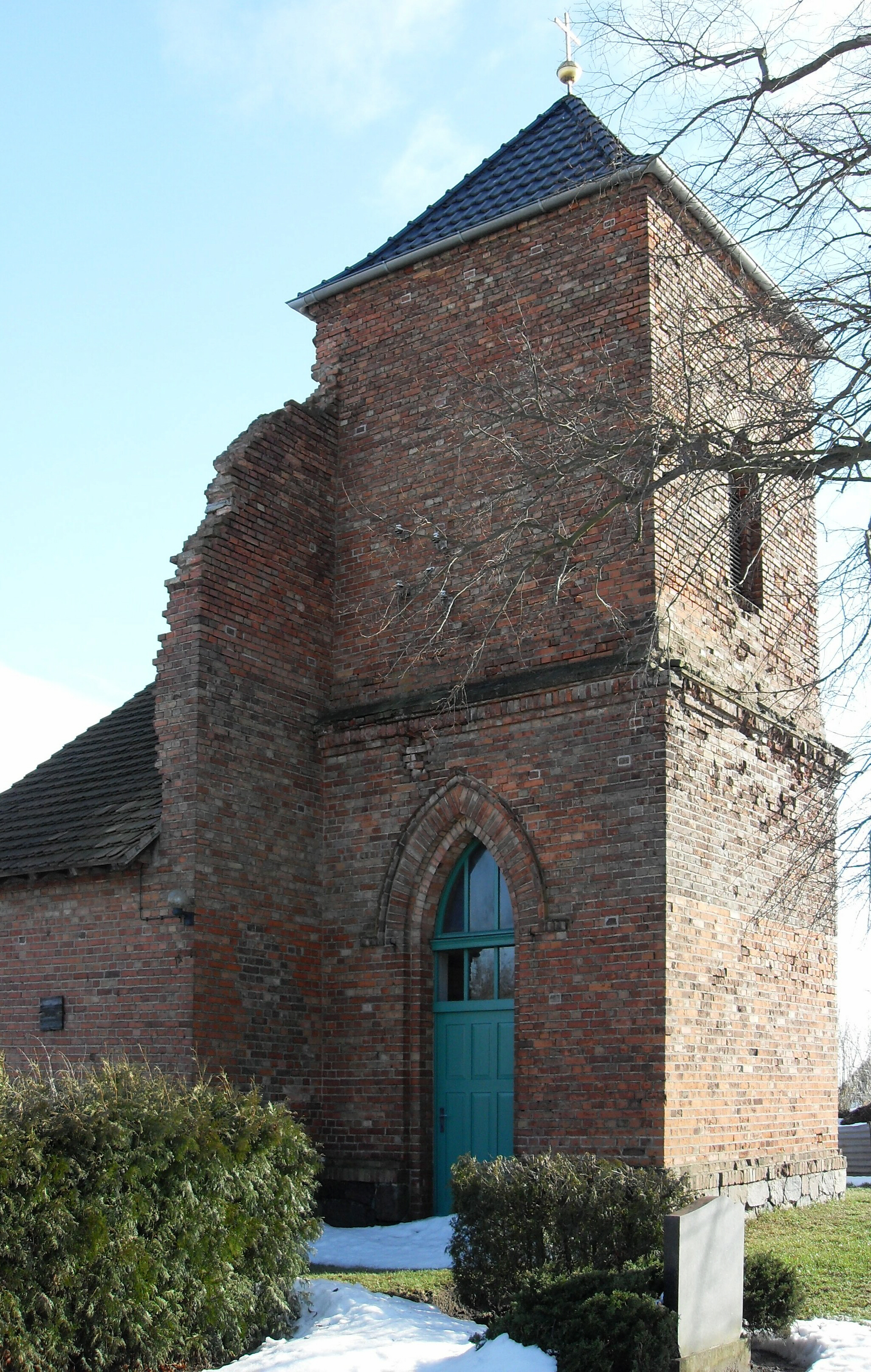 Kirche in Carzig, Gemeinde Fichtenhöhe, Deutschland